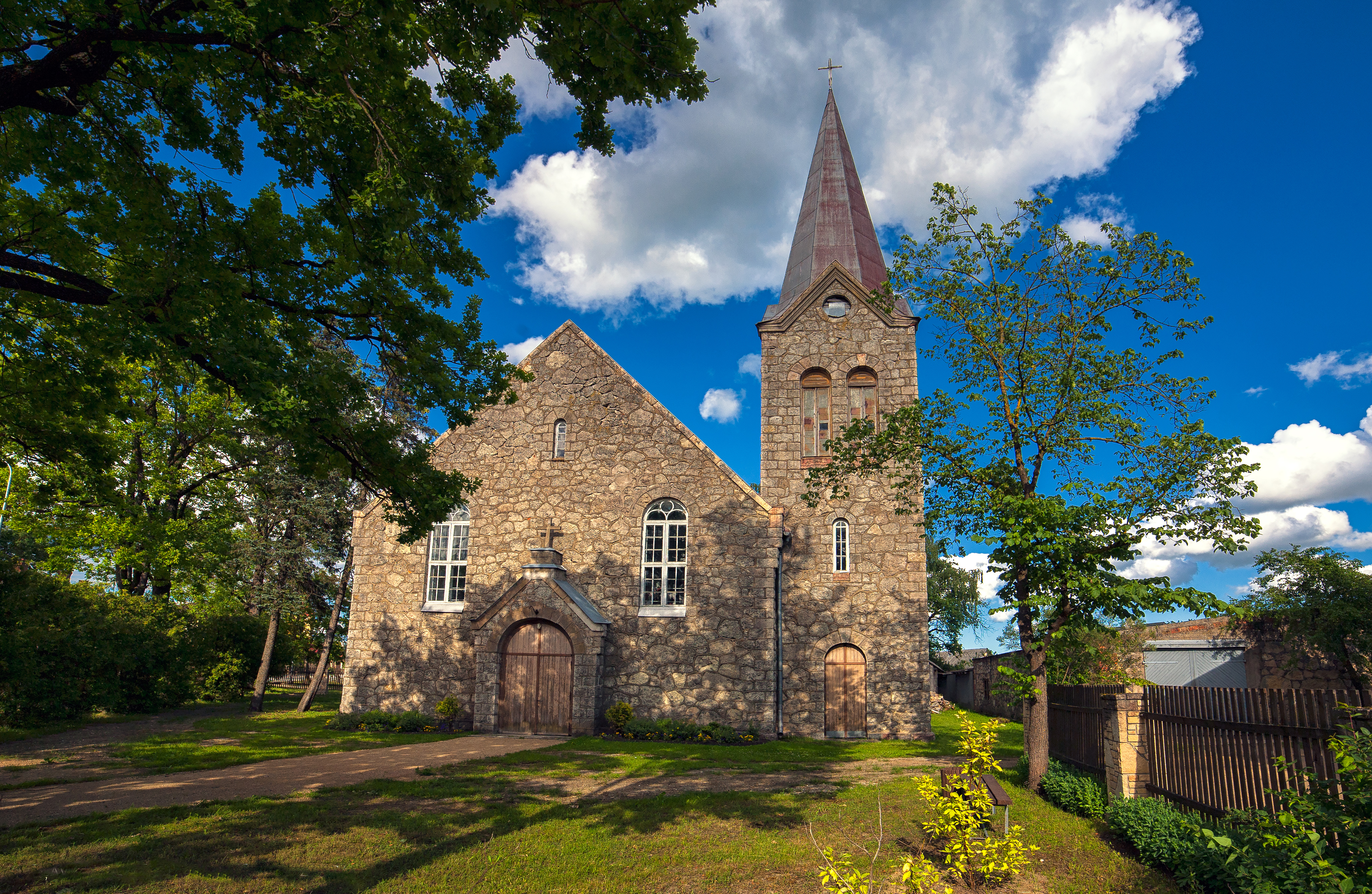 Pļaviņu luterāņu baznīca, Pļaviņas, Raiņa iela 18